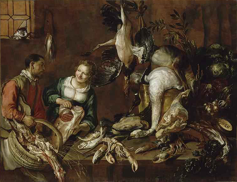 Felice Boselli: Marchande de volailles et de poissons